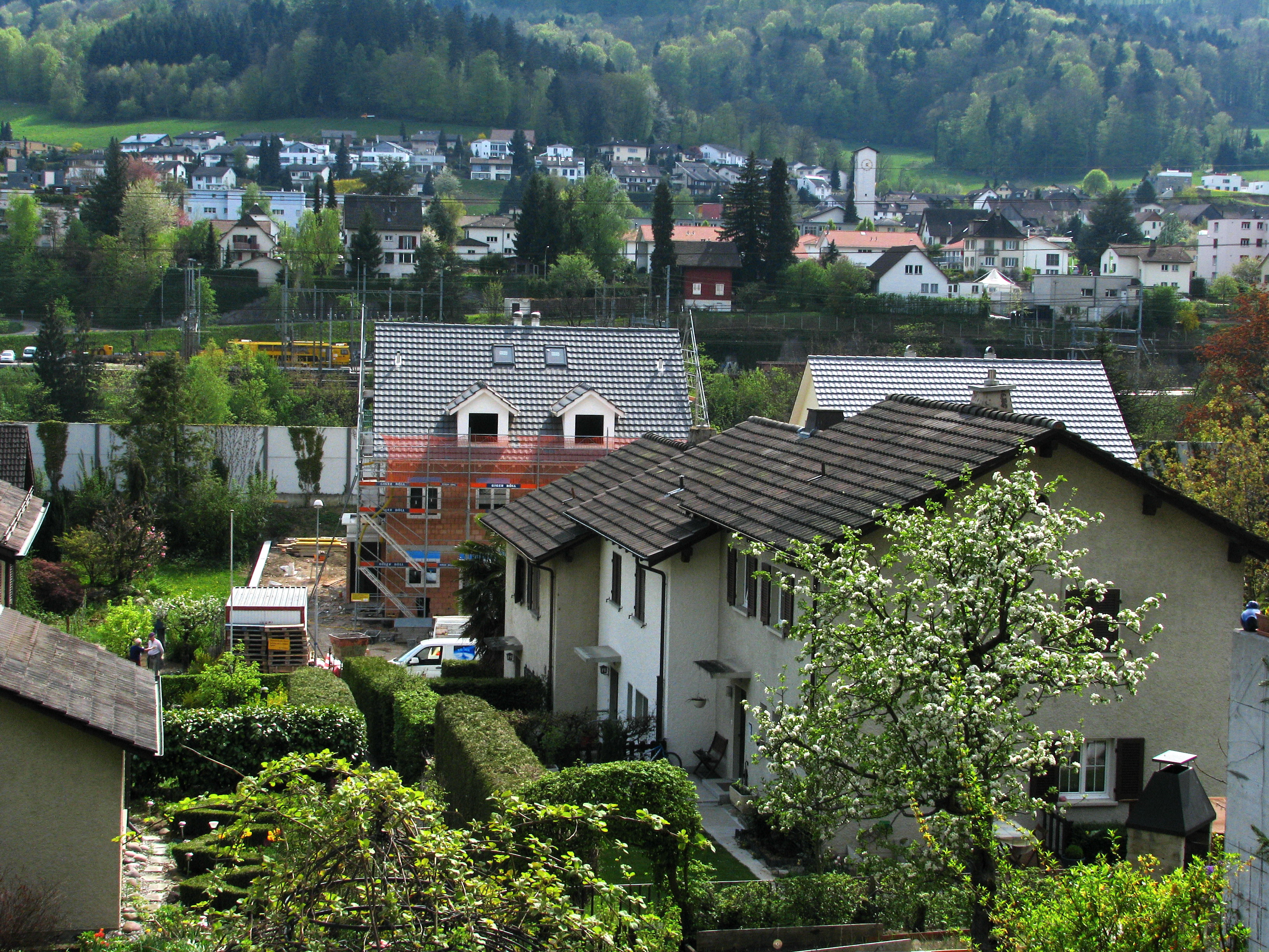 Killwangen as seen from Würenlos